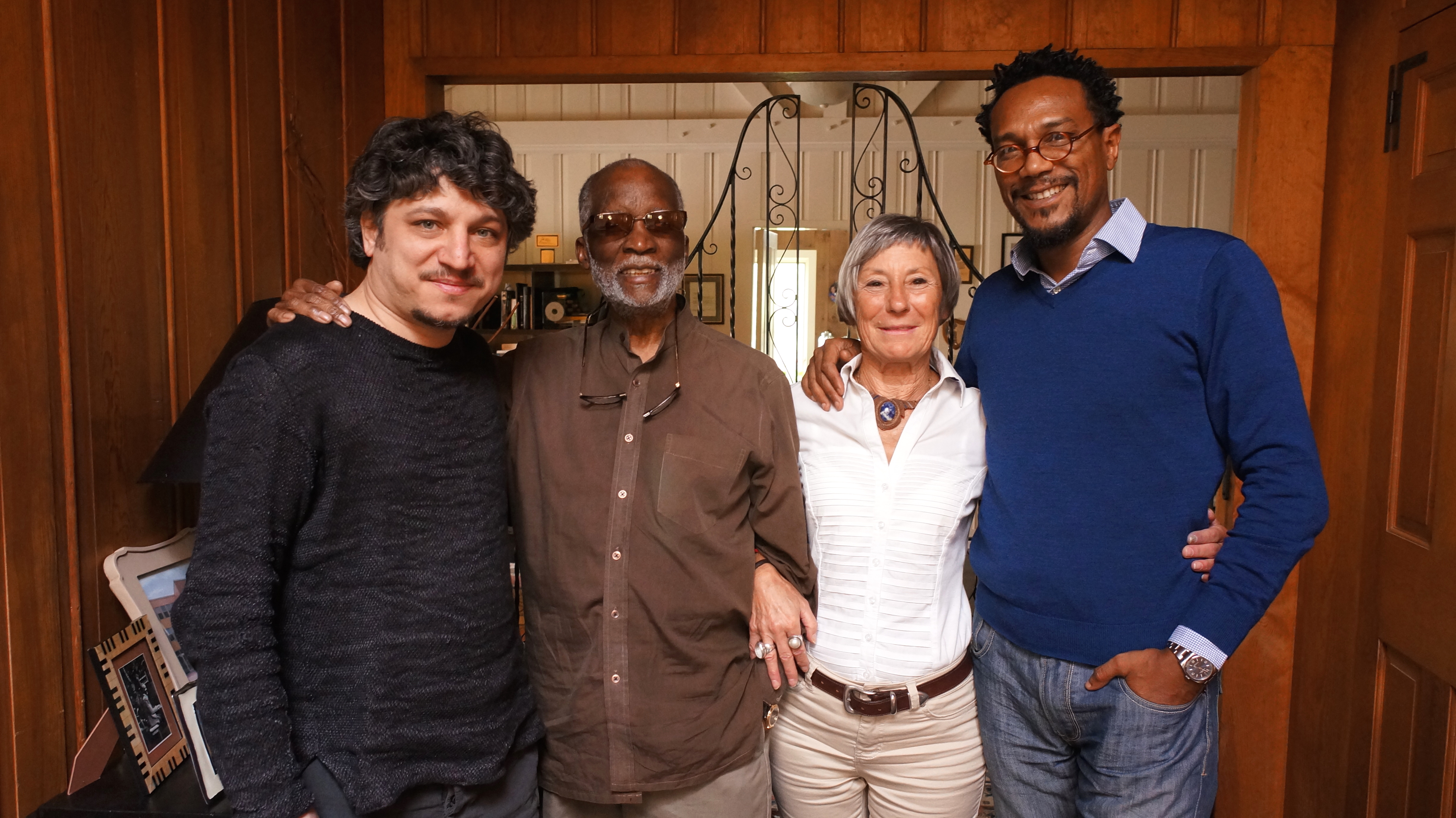 with great Mr. Jamal